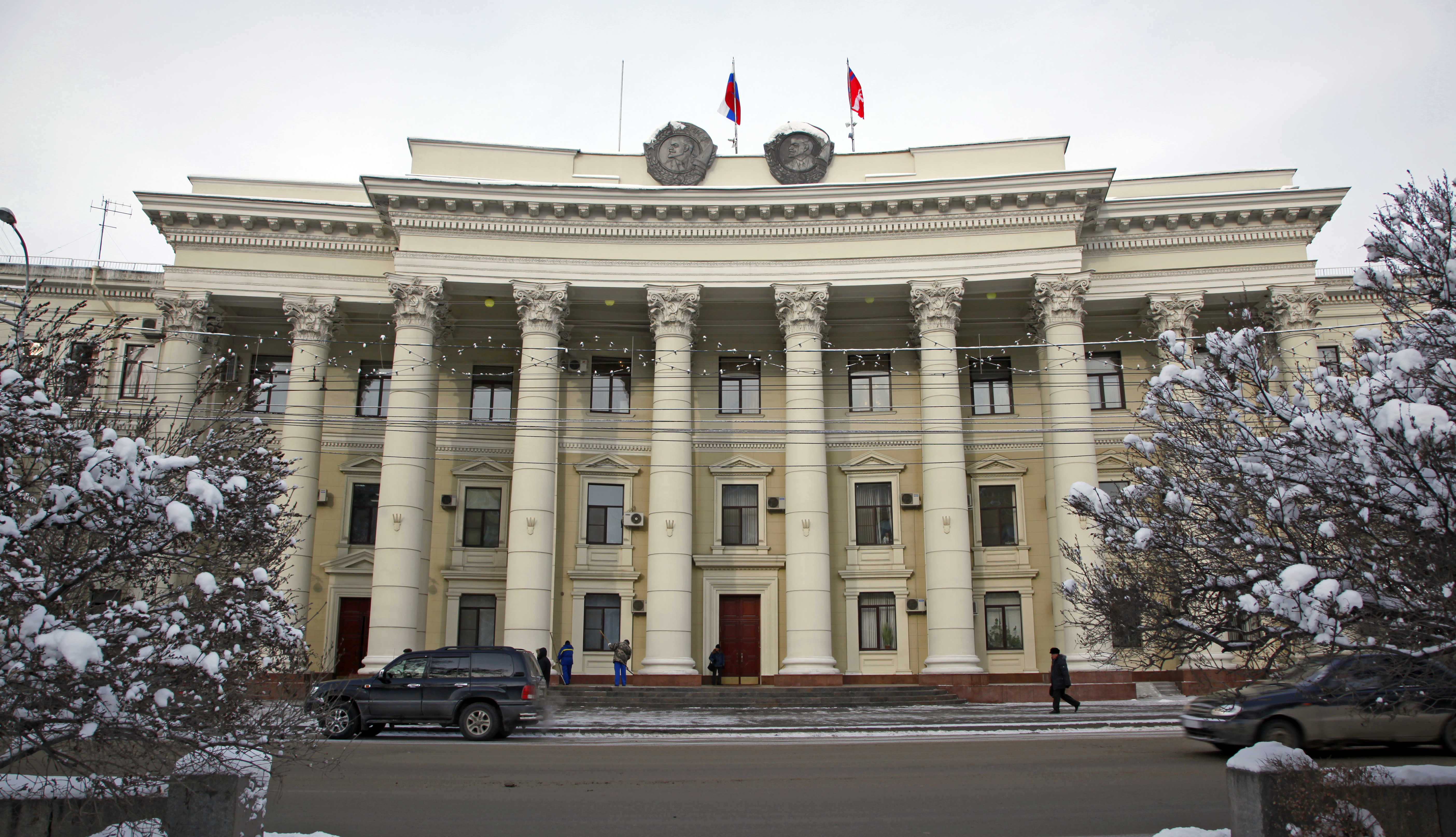 Здание Волгоградского областного комитета КПСС и облисполкома (ныне Администрация Волгоградской области и Волгоградская областная Дума). Года постройки: 1950-1953 гг. Архитектор Обухов Е.И., Кулев А.С. Адрес: Волгоград, пр. Ленина, 9. Памятник архитектуры регионального значения.